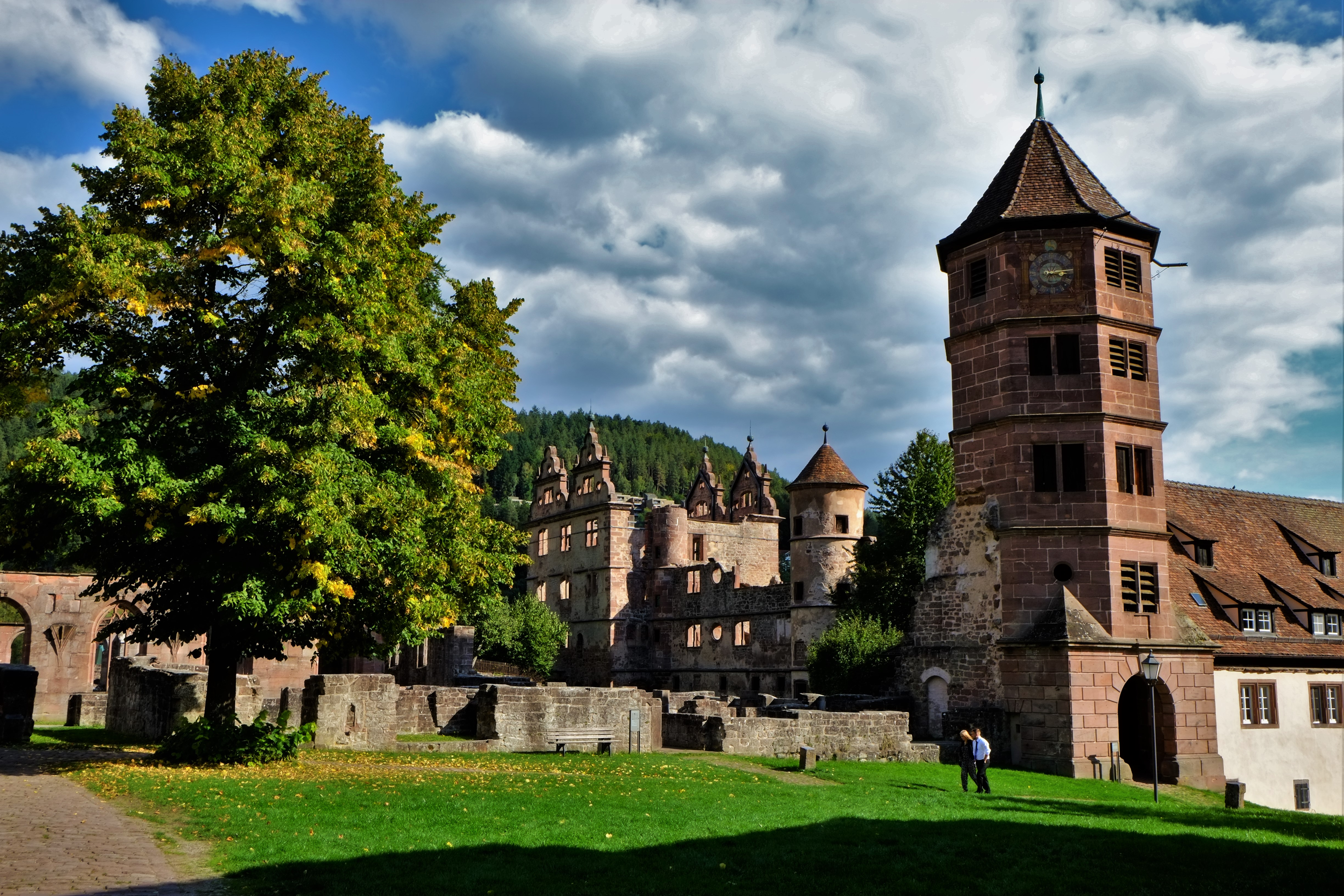 Das Foto zeigt das Kloster Hirsau in Hirsau im Kreis Calw, Schwarzwald.